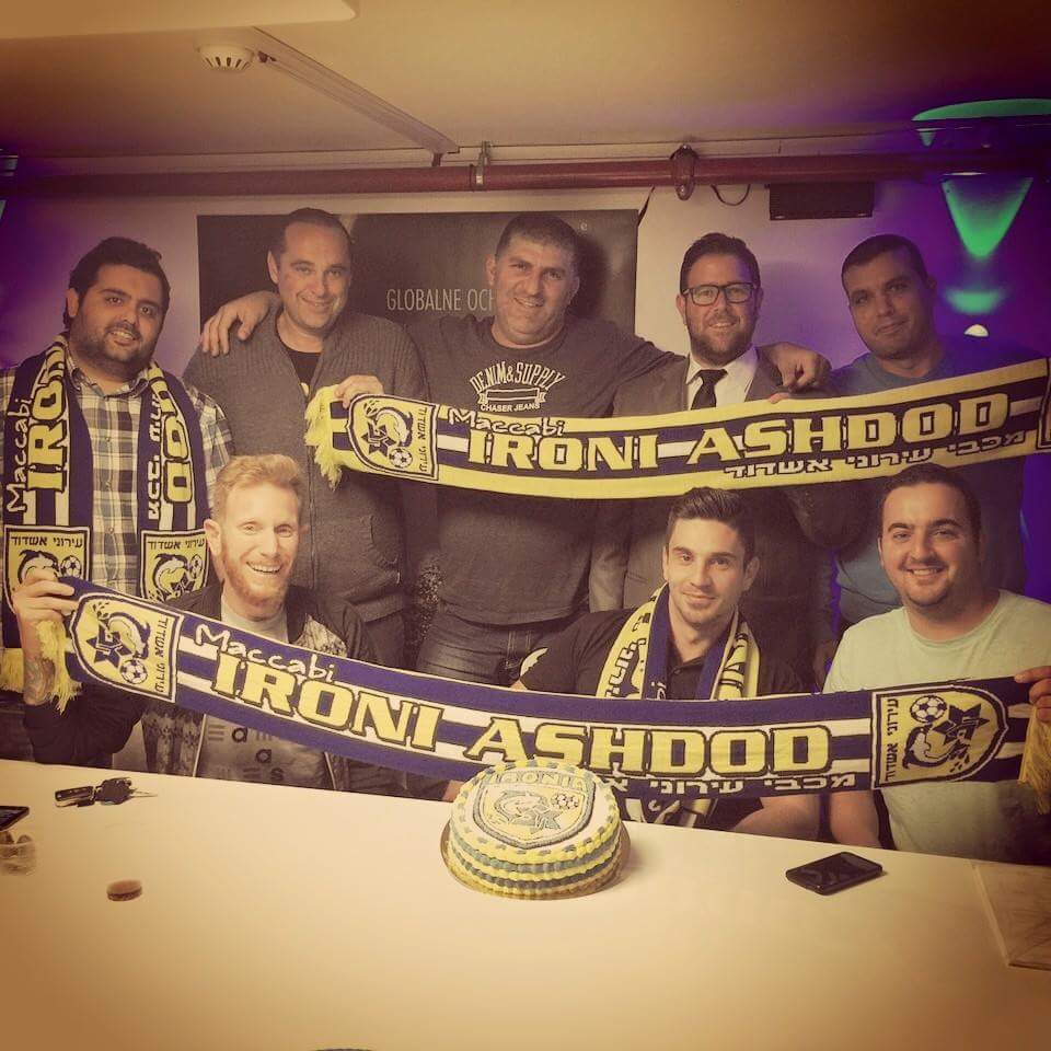 שבעת מייסדי העמותה ועורך הדין חנוך דרך ארליך, במעמד החתימה על הקמת עמותת "דולפיני אשדוד". המפעילה את מועדון הכדורגל מכבי עירוני אשדוד.